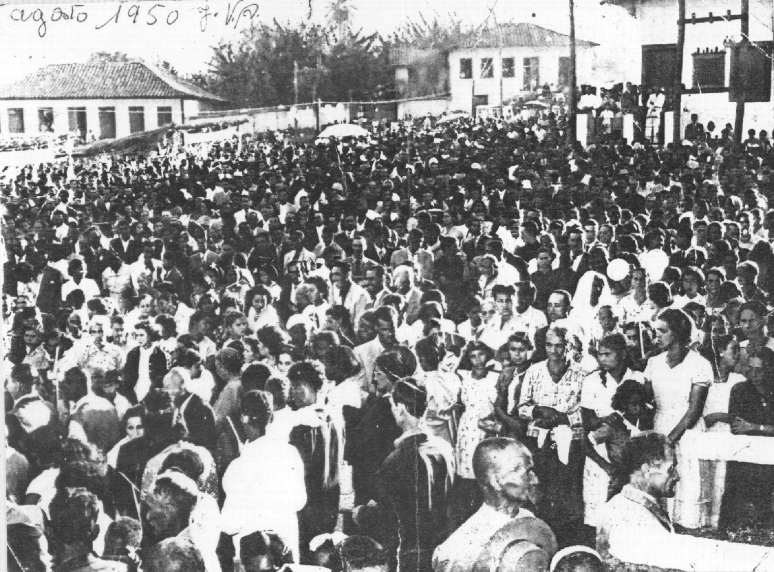 Festa de Nossa Senhora da Saúde em Lagoa Santa/MG - 1950 (Fonte: Acervo Prefeitura Municipal de Lagoa Santa)